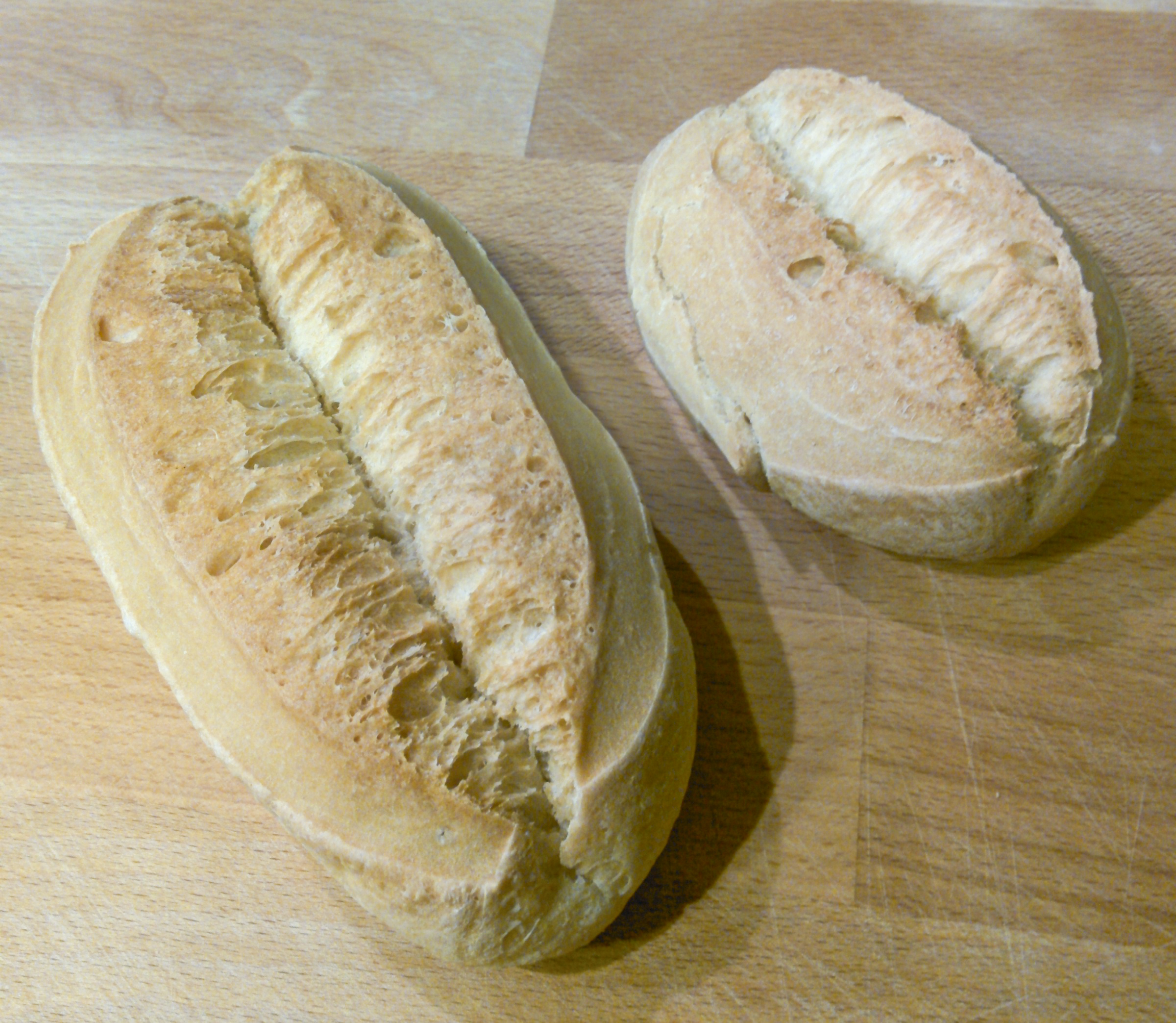 Tipus de pa anomenat també panet francès.